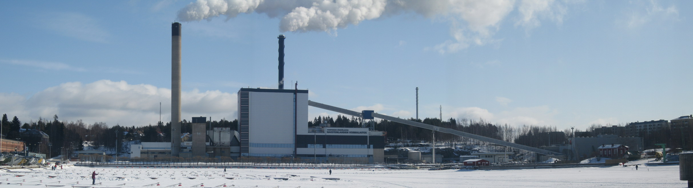 Naistenlahden voimalaitos maaliskuussa 2006.